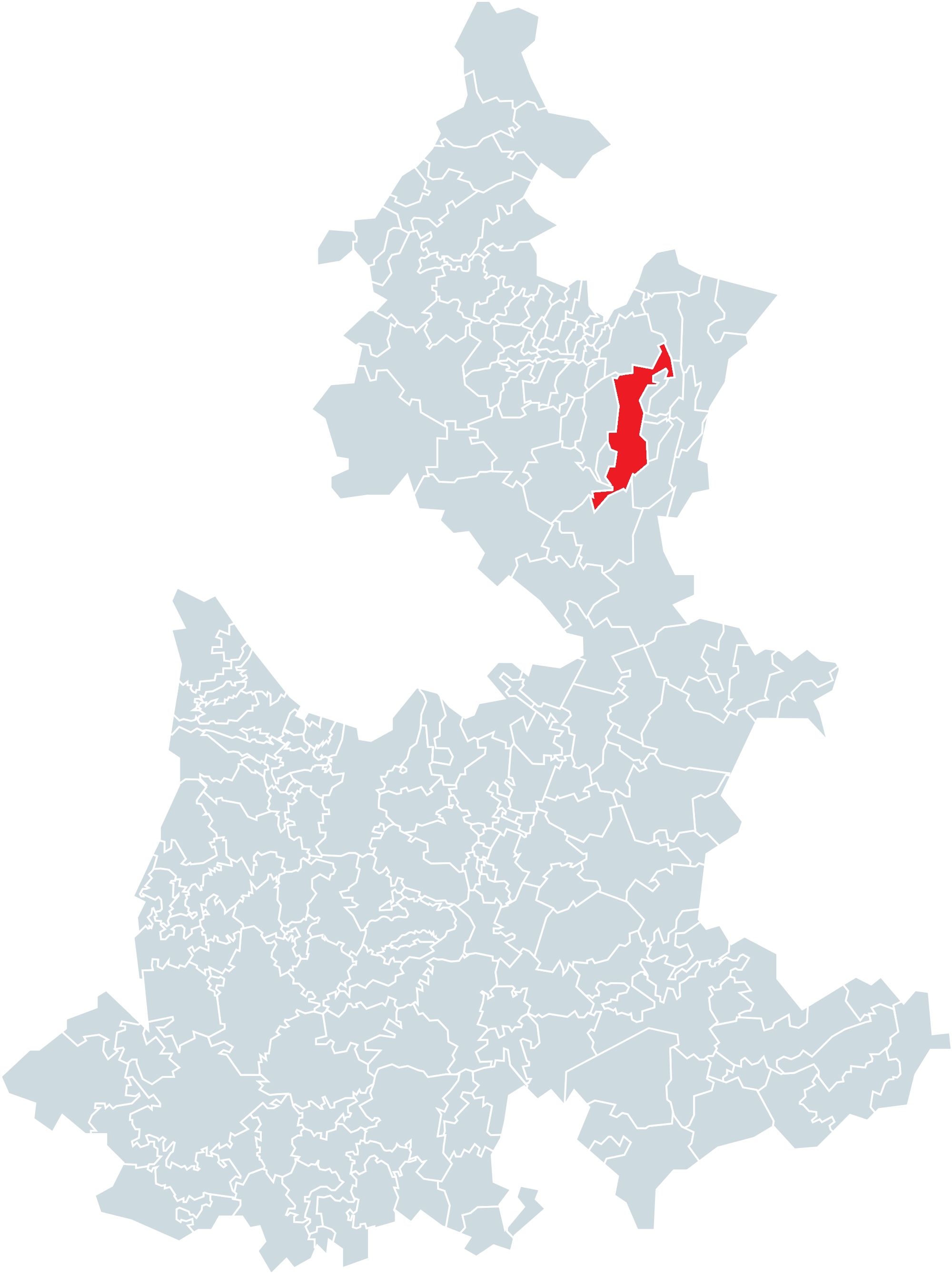 Municipio de Tlatlauquitepec